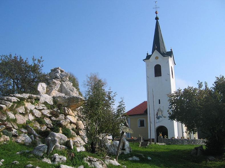 Cerkev sv. Miklavža na vzpetini Gradišče (519 mnm) pri Mekinjah nad Stično. Zraven cerkve je Lavričeva lovska koča.